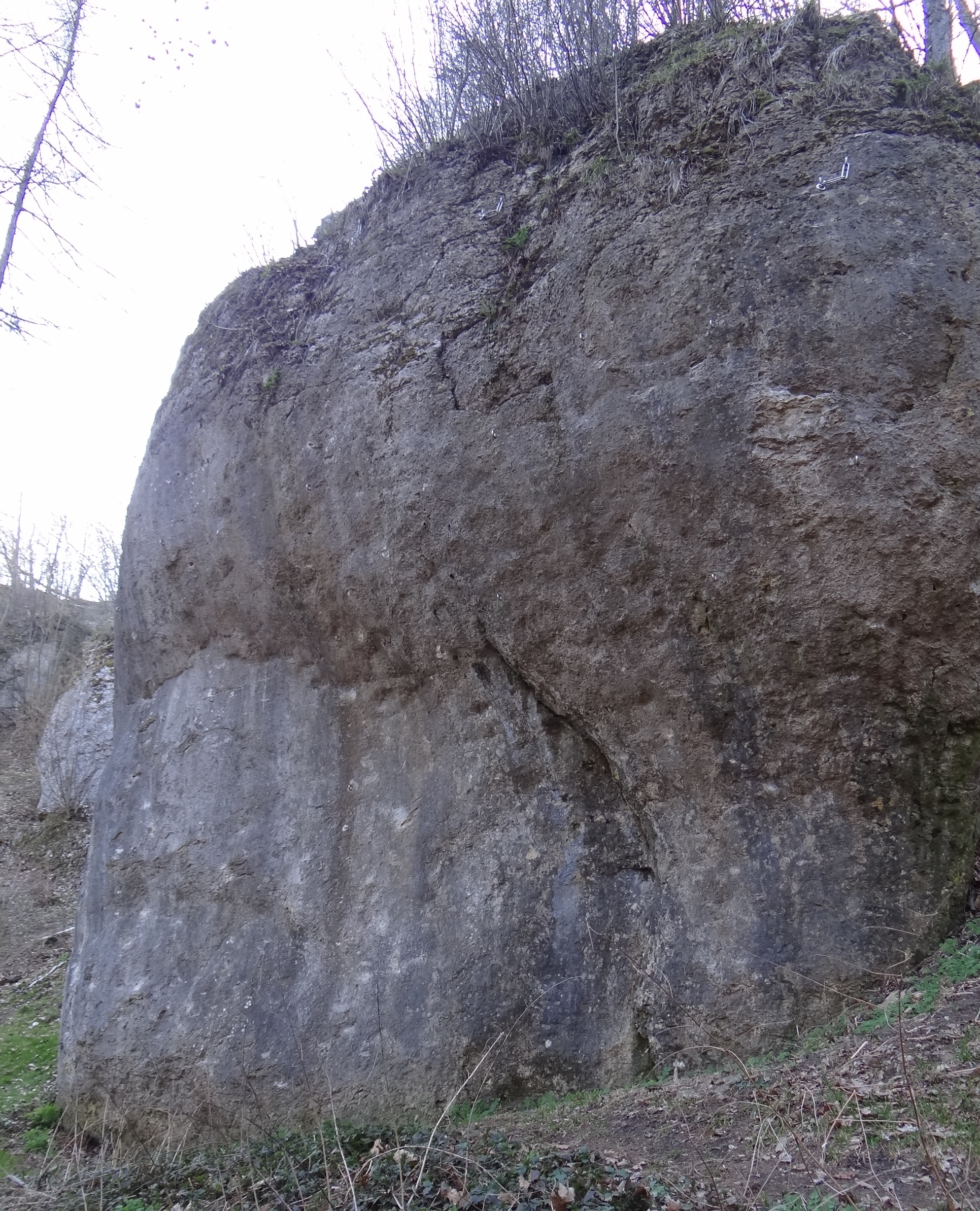 Skała Obchodnia w Dolinie Brzoskwinki